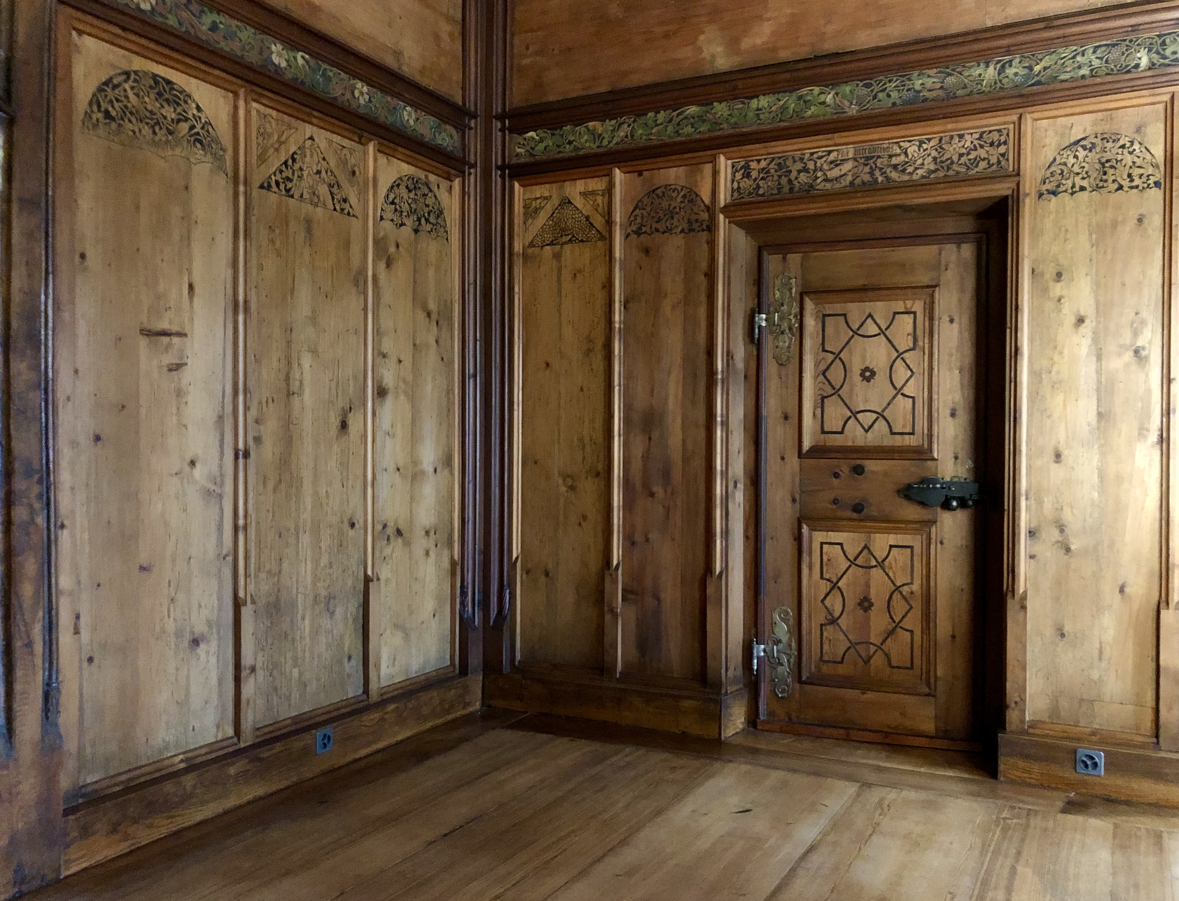 Täfer von 1521 aus dem ehemaligen Kloster Oetenbach in Zürich. Heute im Landesmseum.